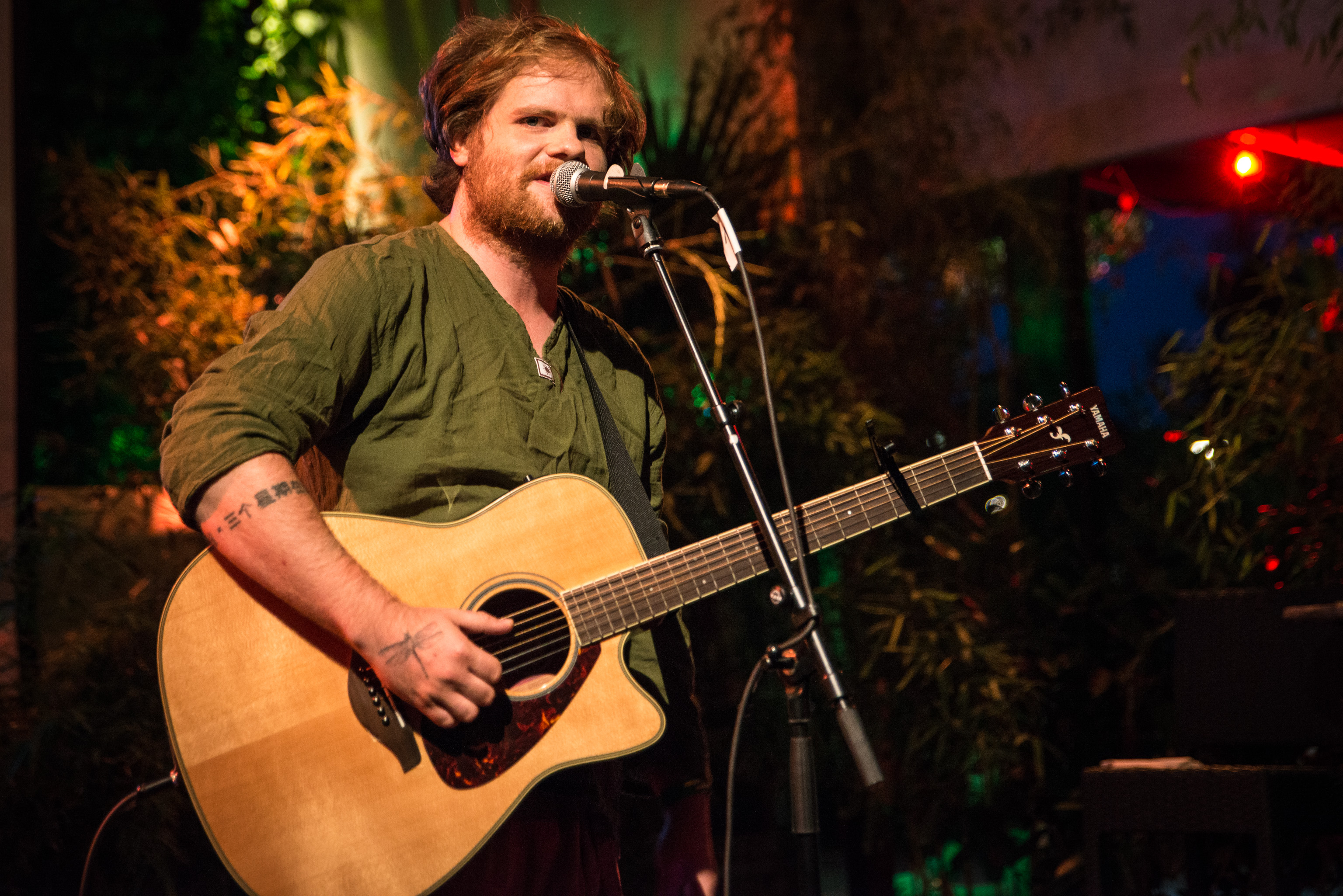 de